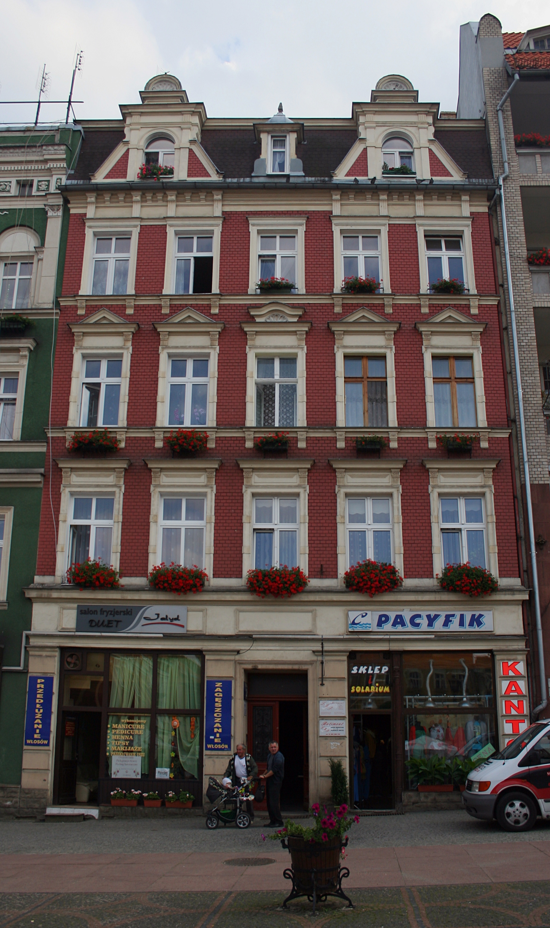 Wałbrzych, Rynek 14 - kamienica, 1900-05 (zabytek nr 1640/WŁ z 14.12.1998)